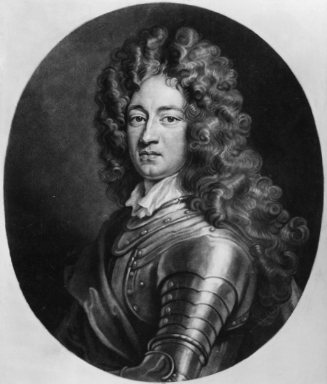 Gallas, Herzog von Lucera, Johann Wenzel Graf von (1669 - 1719)title QS:P1476,de:"Gallas, Herzog von Lucera, Johann Wenzel Graf von (1669 - 1719)" label QS:Lde,"Gallas, Herzog von Lucera, Johann Wenzel Graf von (1669 - 1719)"